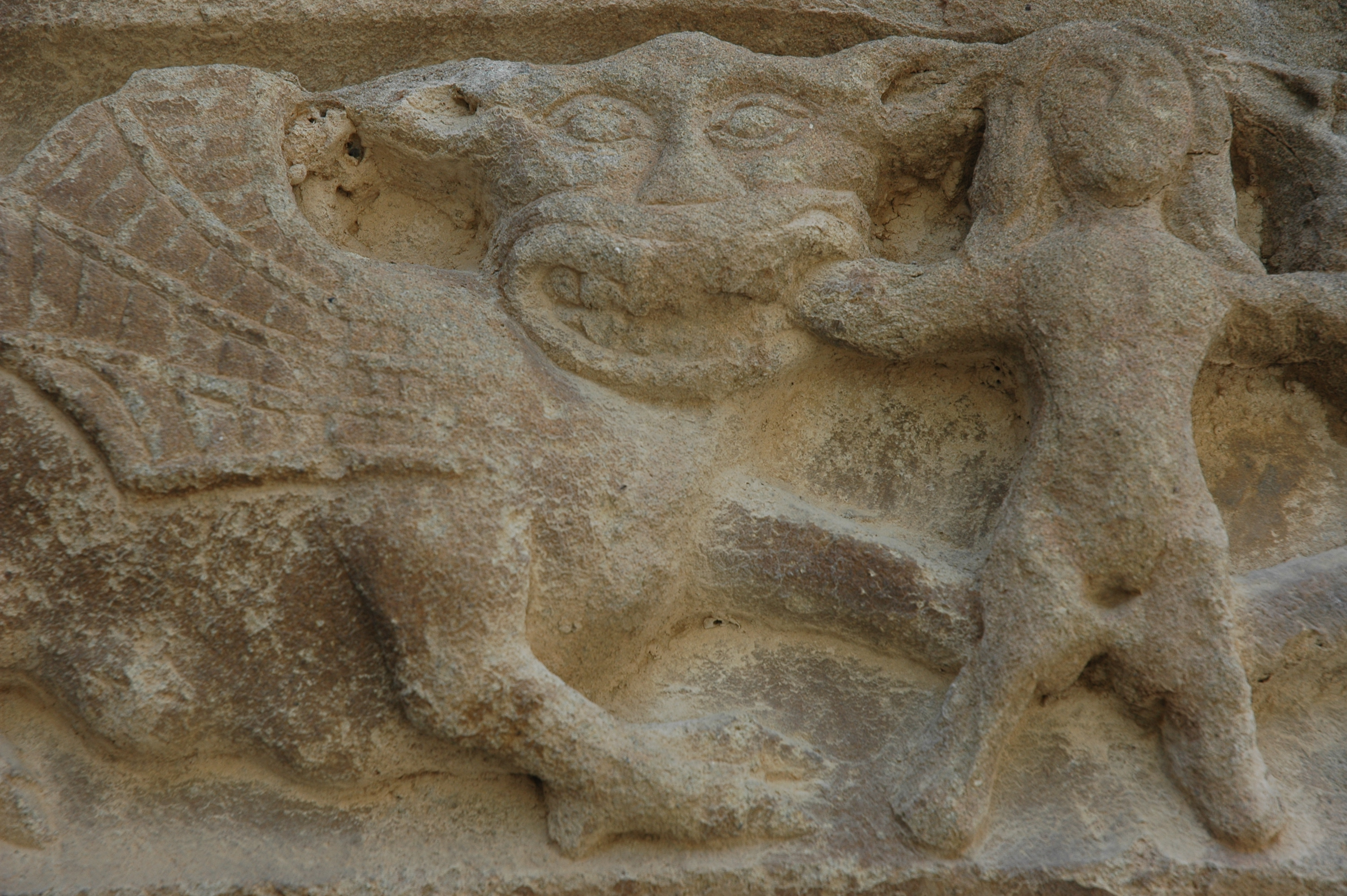 Fris de migdia, Sant Joan de Foixà